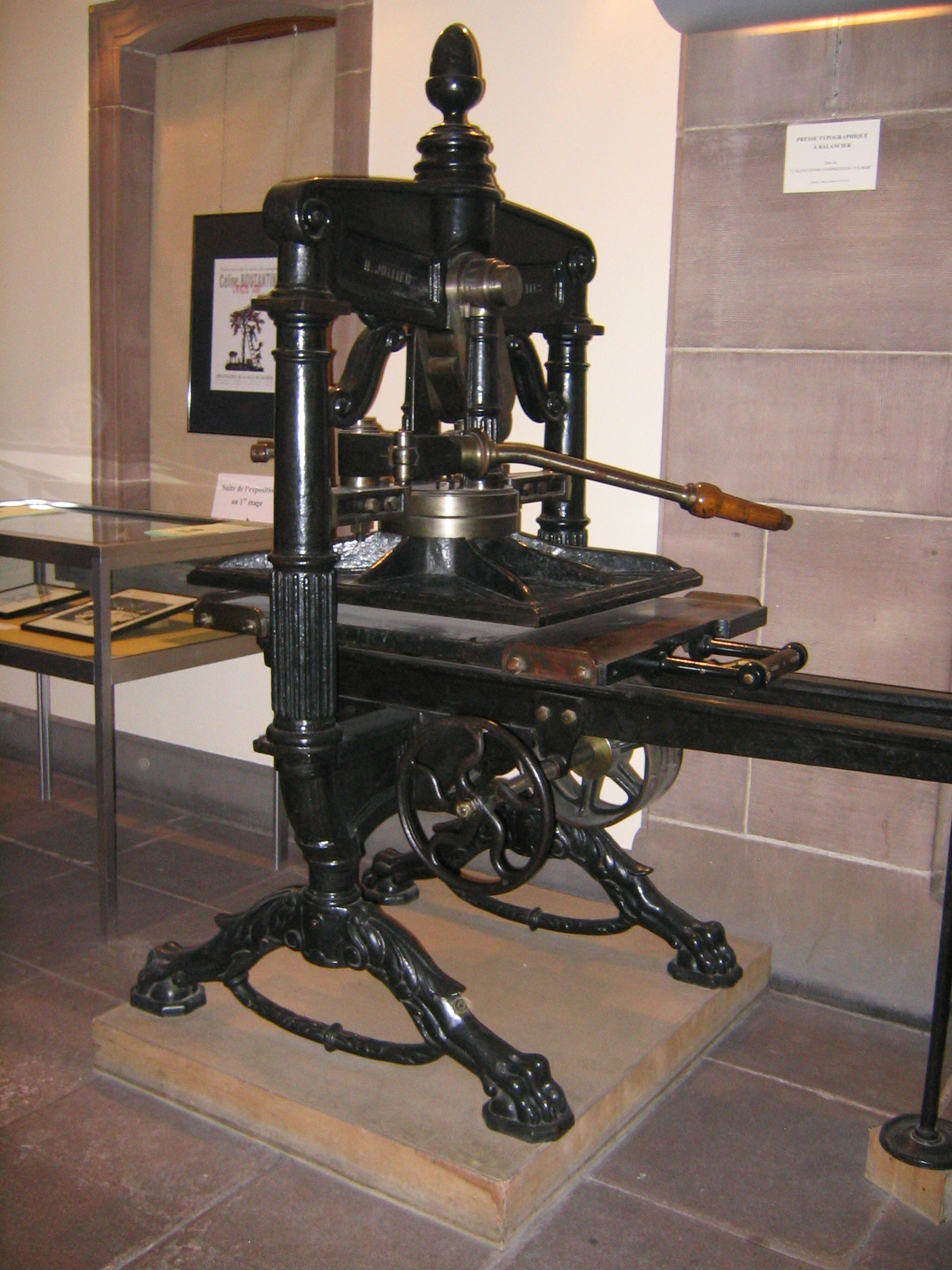 Une presse typographique à balancier- Don de "L'alsacienne d'impression Colmar"